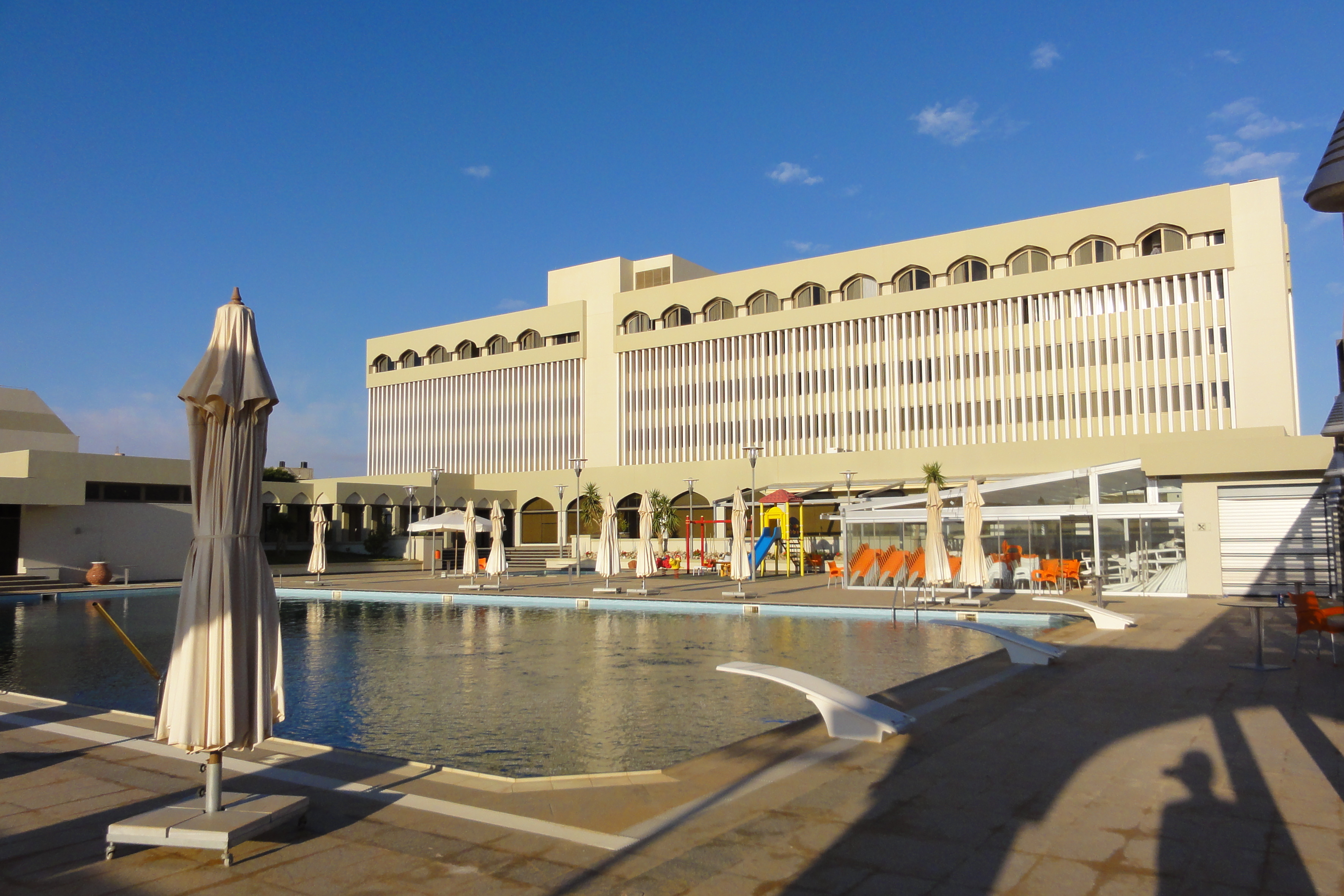 Masira hotel